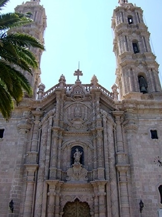 Santuario de Guadalupe